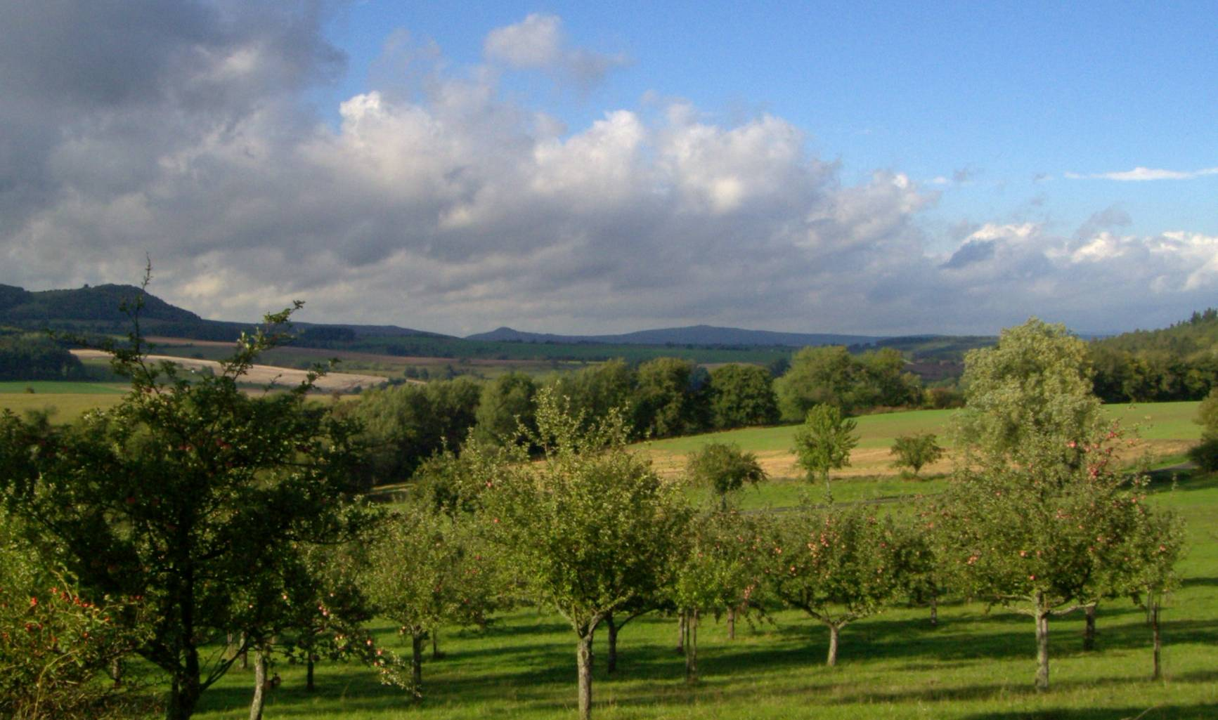 Blick auf den Pleß (645,4 m) an der Nahtstelle der Rhön zum Salzunger Werrabergland von Richtung Süden. Links ist die 620 m hohe Stoffelskuppe sichtbar.